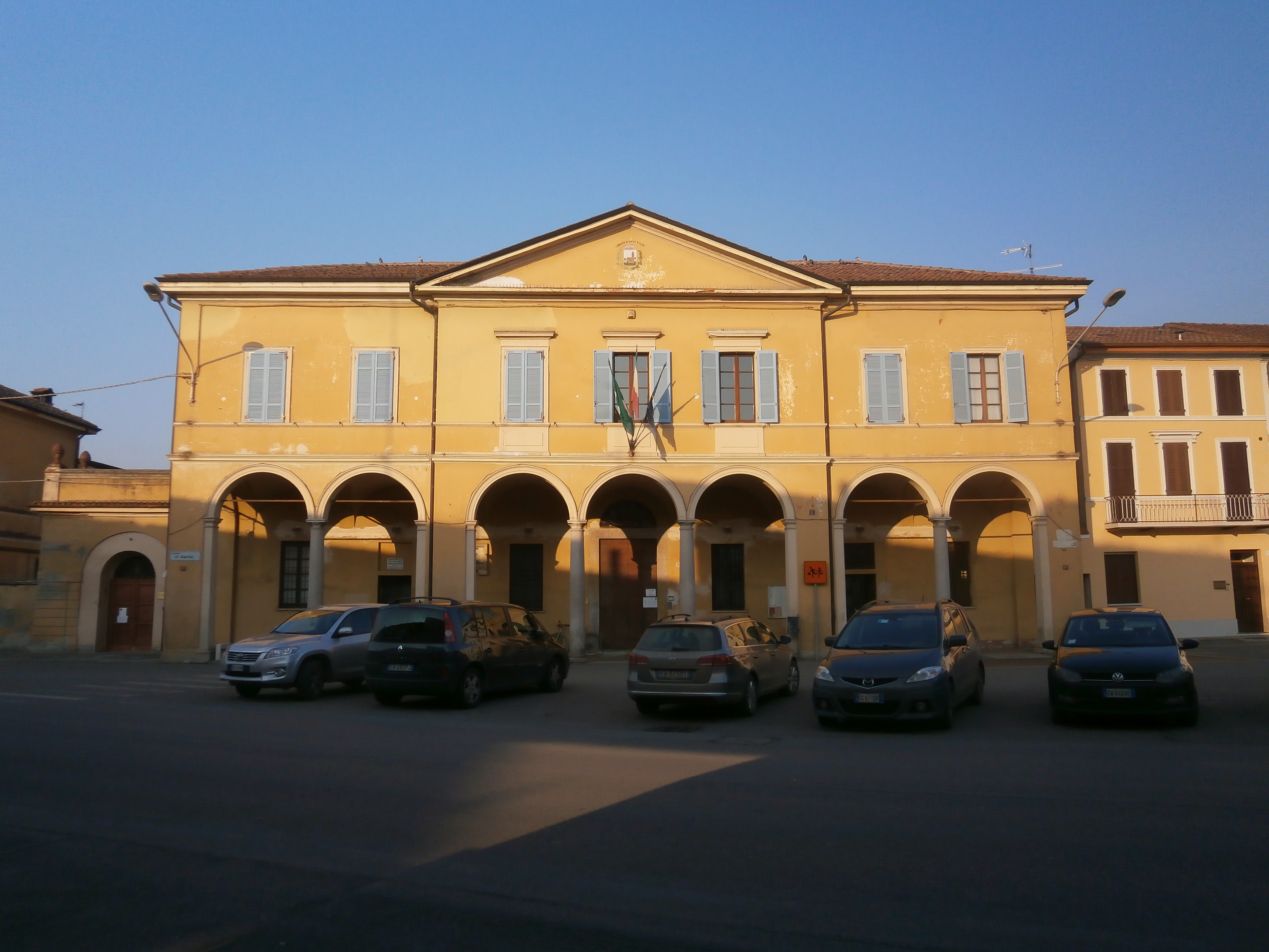 Pieve d'Olmi - Palazzo Municipale